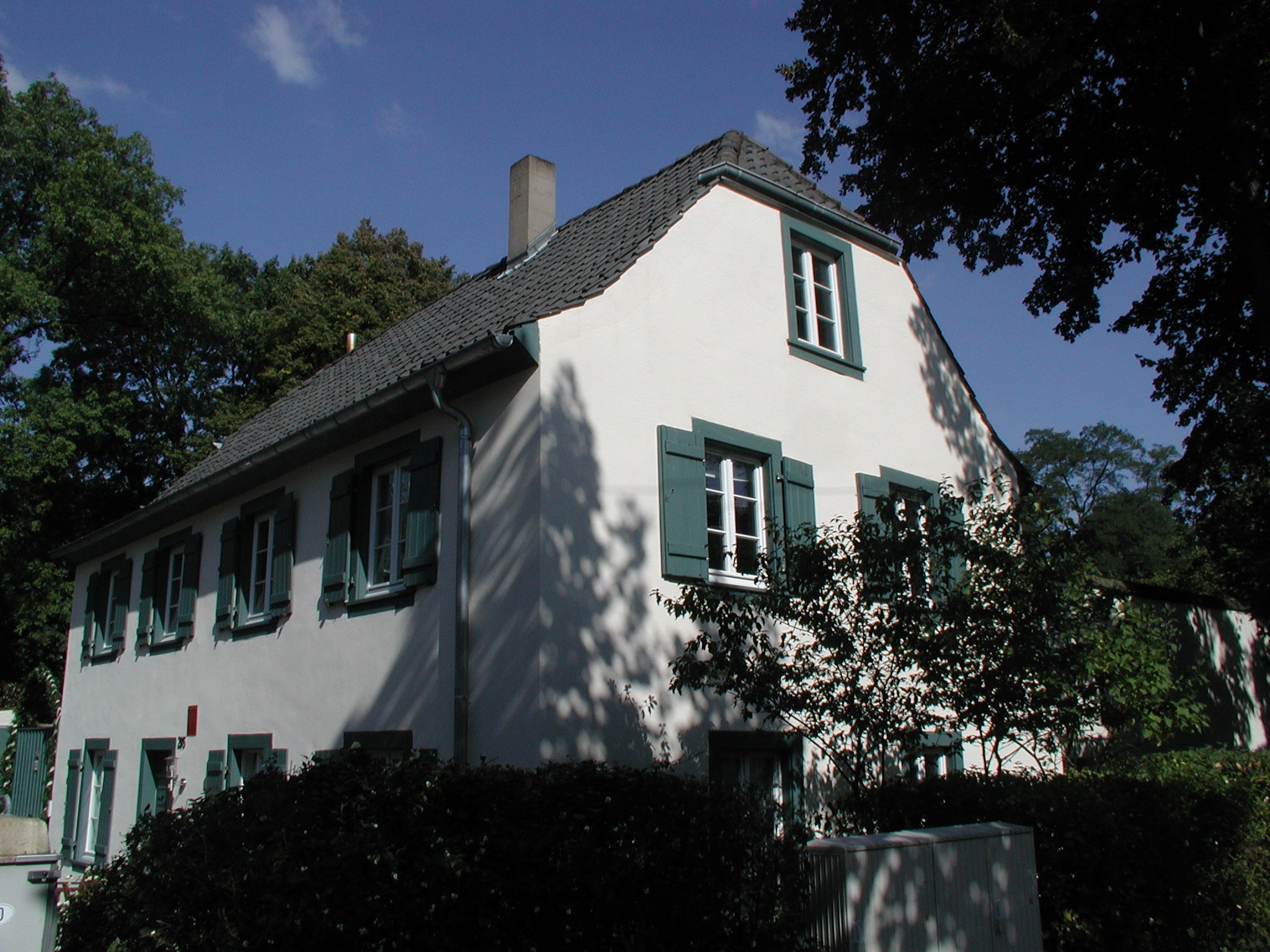 Stadtwald Köln-Lindenthal Haus Dürener Straße 285. Rest der Kitschburg (1759)